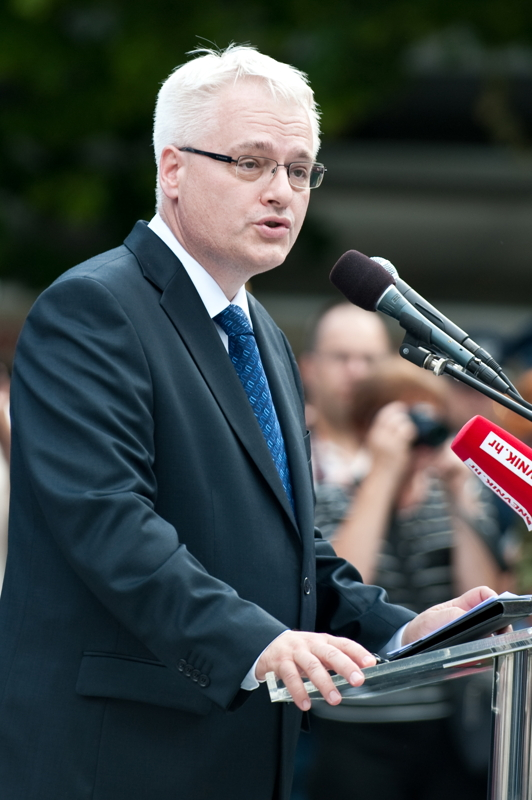 16. obljetnica vojnoredarstvene operacije Oluja u Kninu